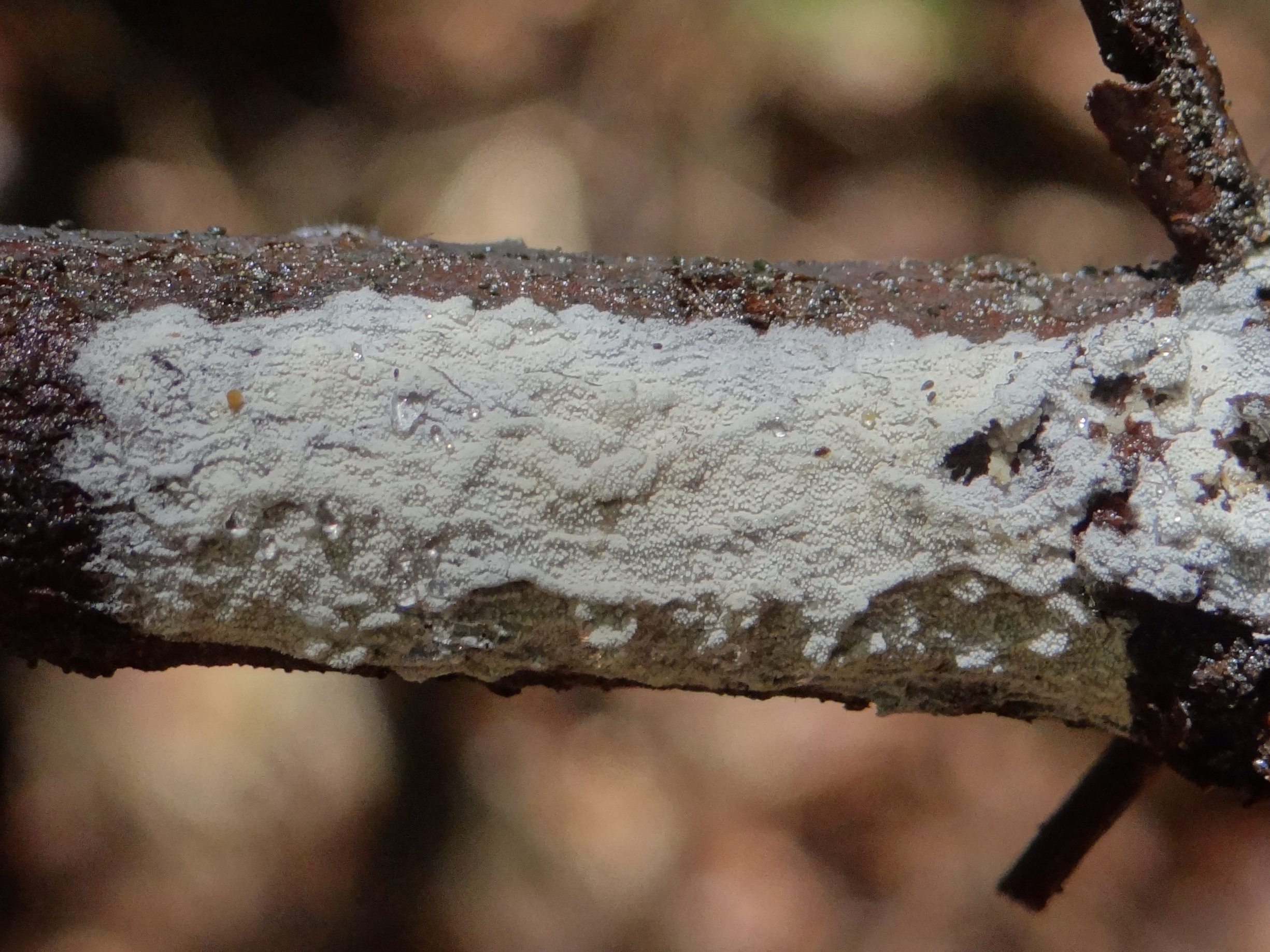 Brevicellicium olivascens (location: Poland, Stare Rybie)